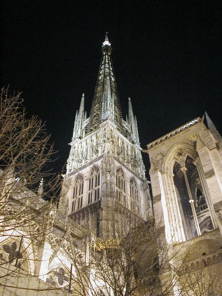 cathédrale de rouen - photographe Richard Groult (2001)